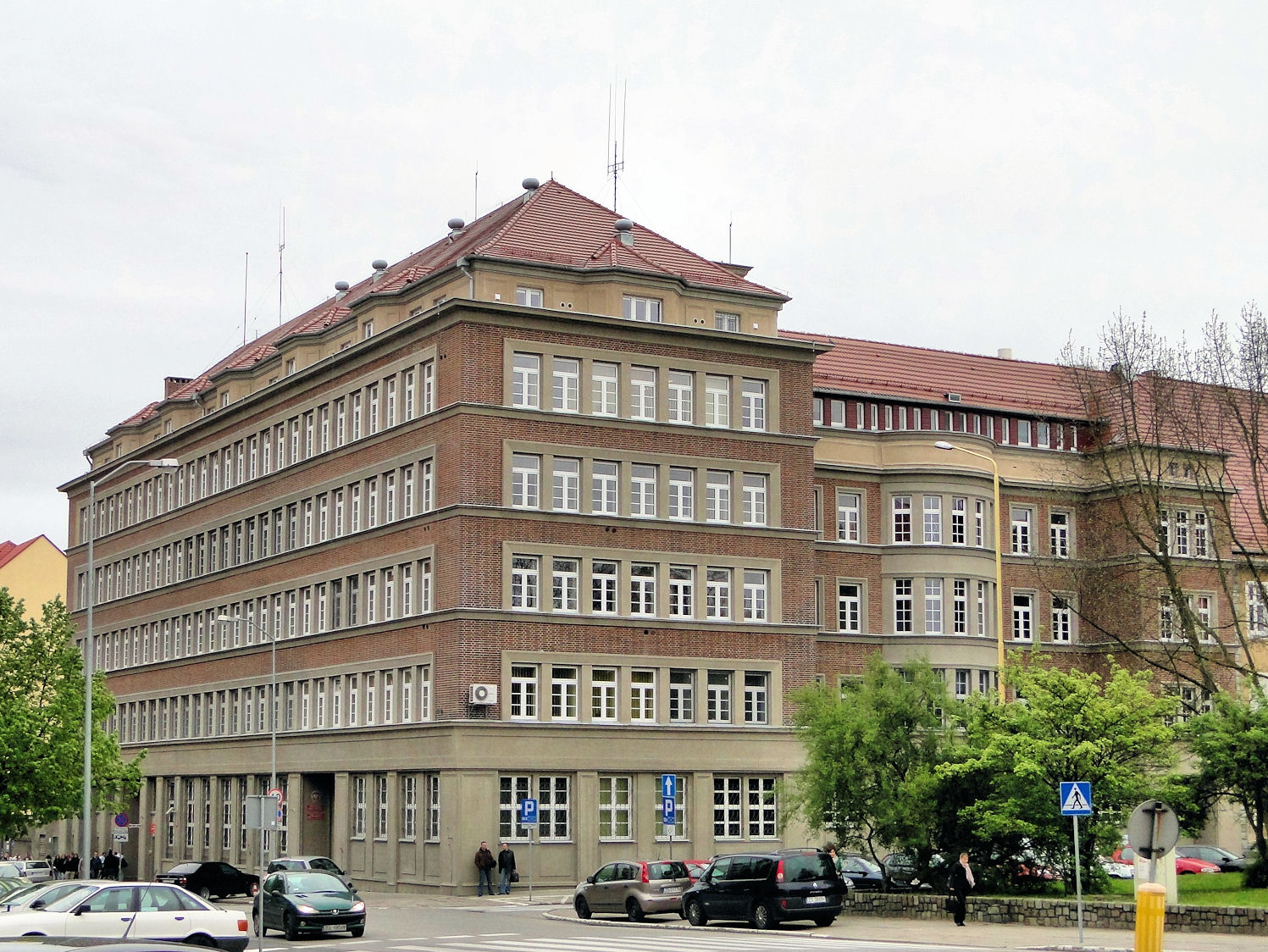 Budynek policji przy ul. Małopolskiej w Szczecinie